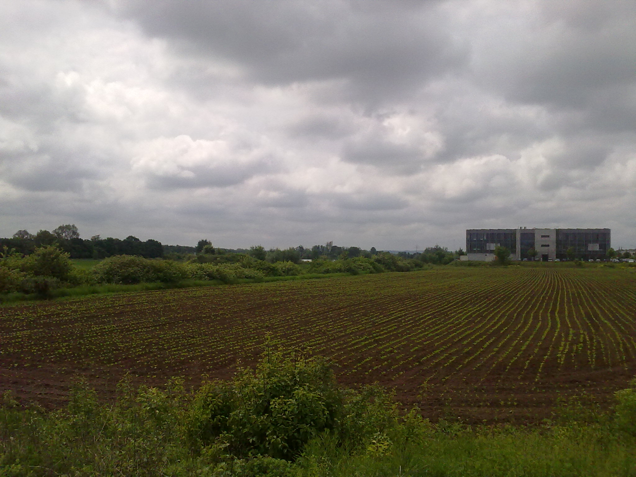 Maintal, Blick auf Baggersee